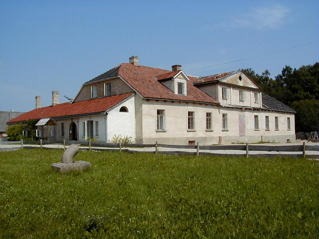 Firkspedvāles muiža Sabilē 2002-07-11